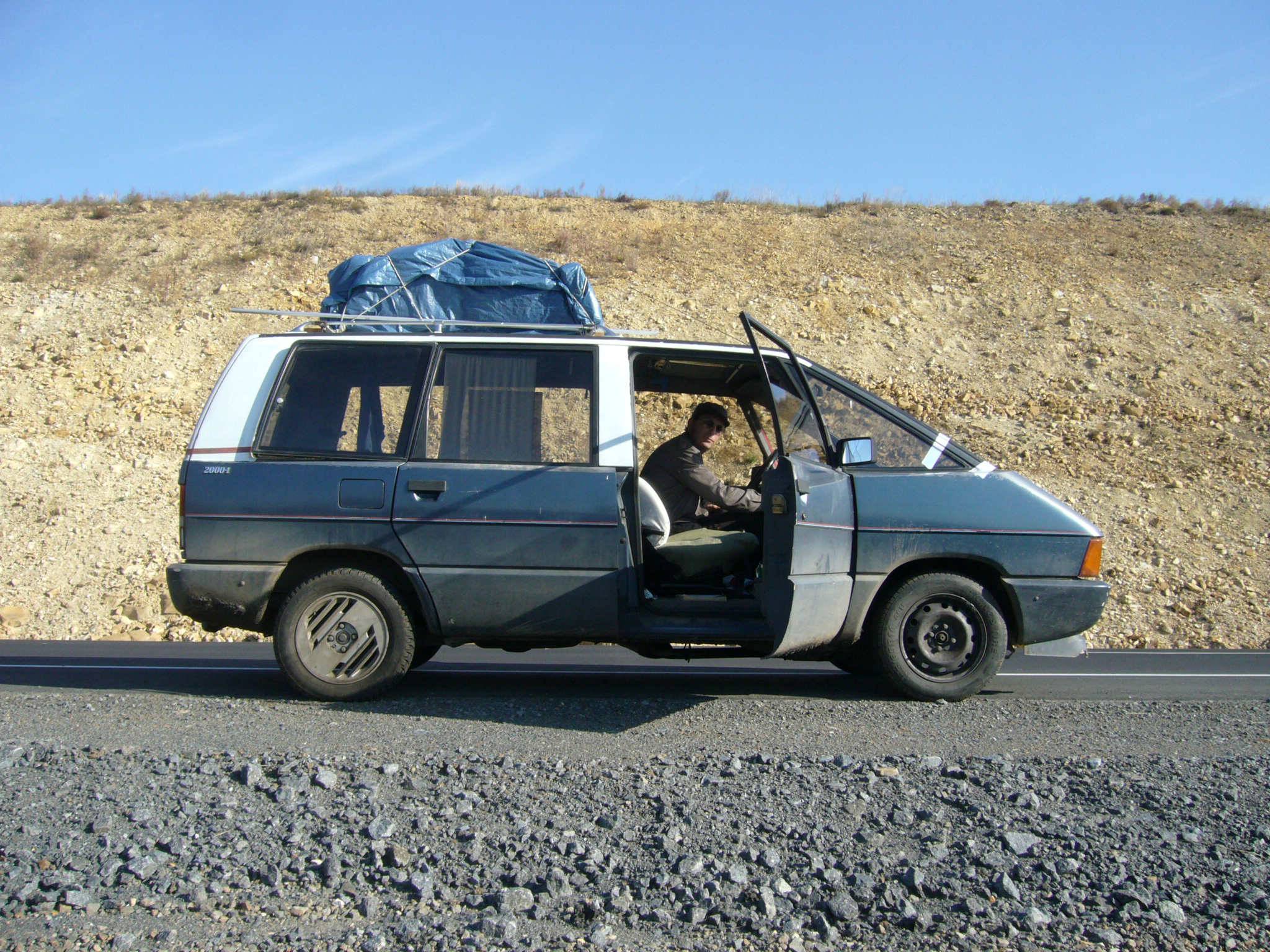 "Aller au Japon (par la route)" a consisté en un voyage de trois mois qui a permis de relier la ville de départ, Paris, à la ville d'arrivée, Tokyo. Ce projet a reçu le soutien de Culturesfrance.